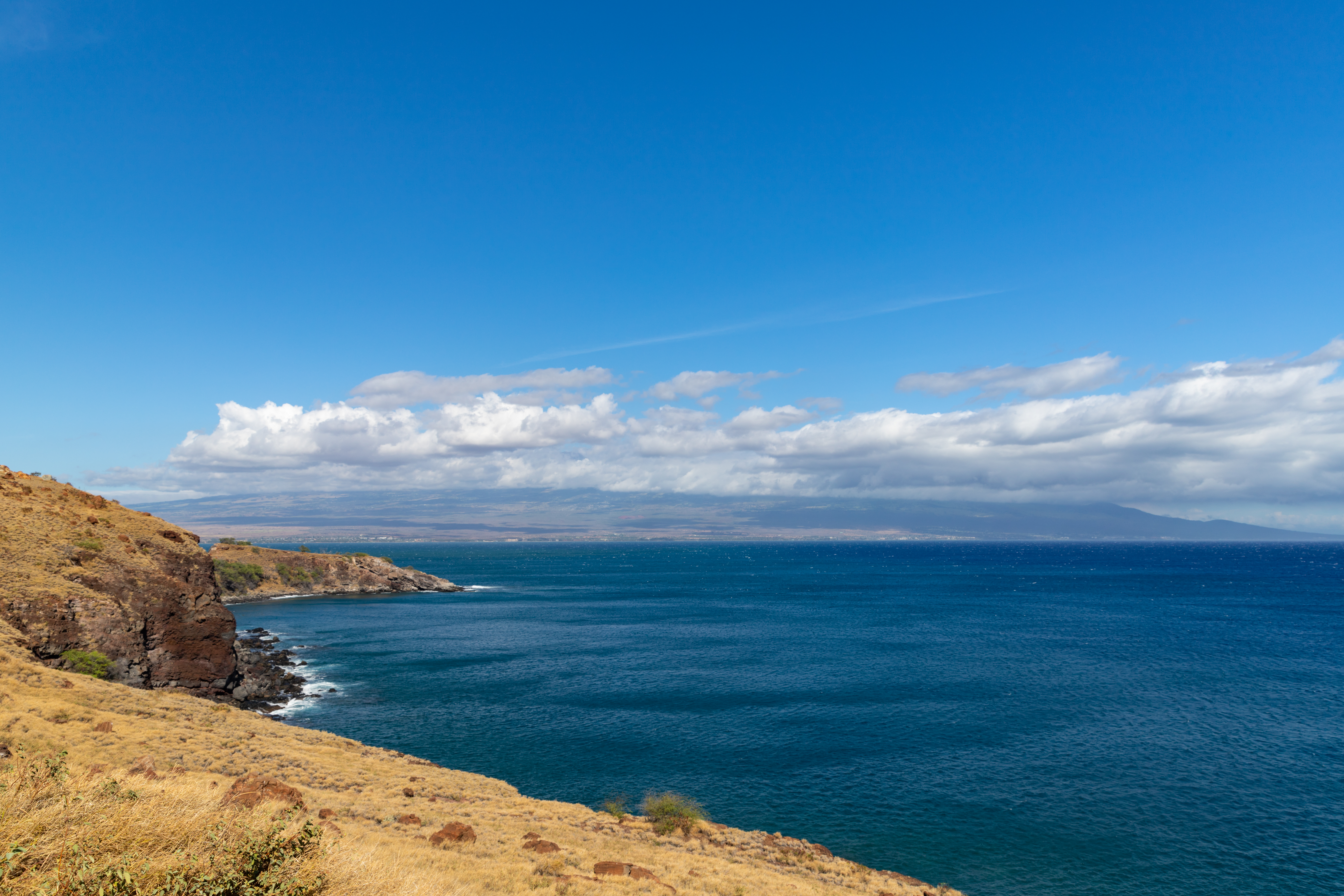 Westküste Maui Hawaii